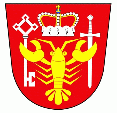 Wappen des tschechischen Dorfes Rudoltice (dt. Rudelsdorf)